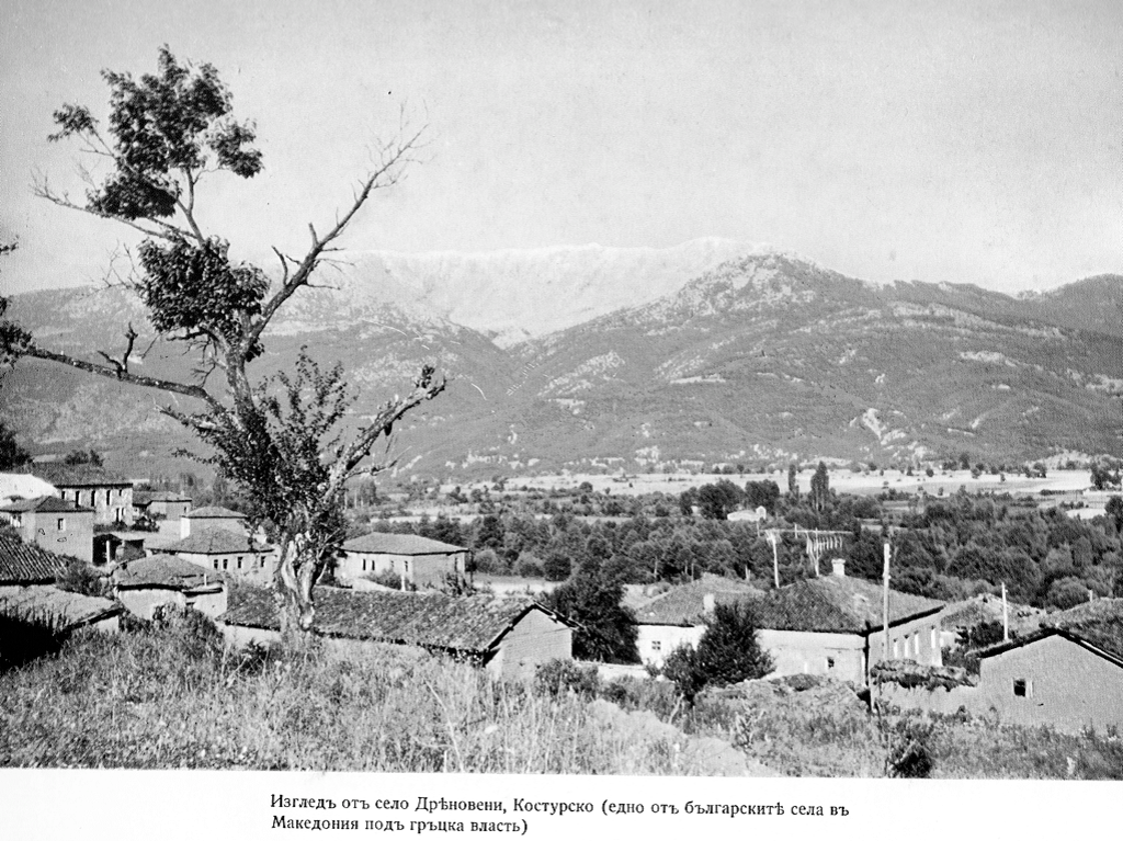 Горно Дреновени и Костолата планина, 1972 година